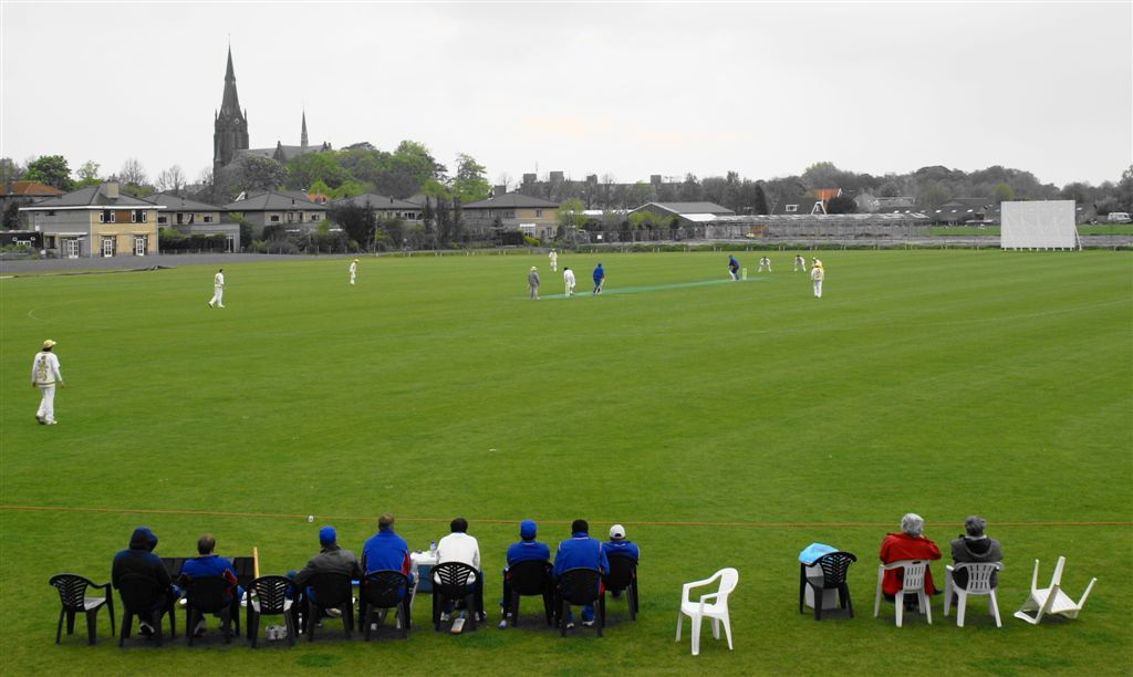 Homeground Voorburg Cricket Club